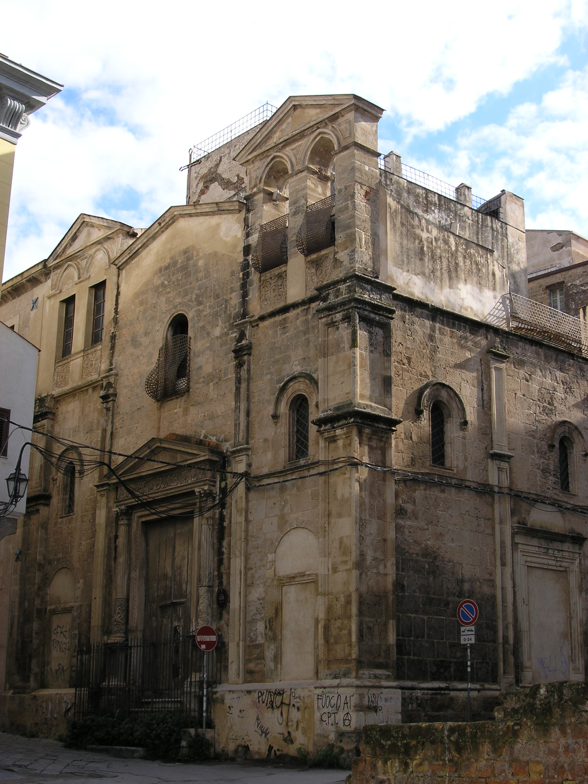 Sicilianu: Crèsia di Sant'Àgata - Guilla